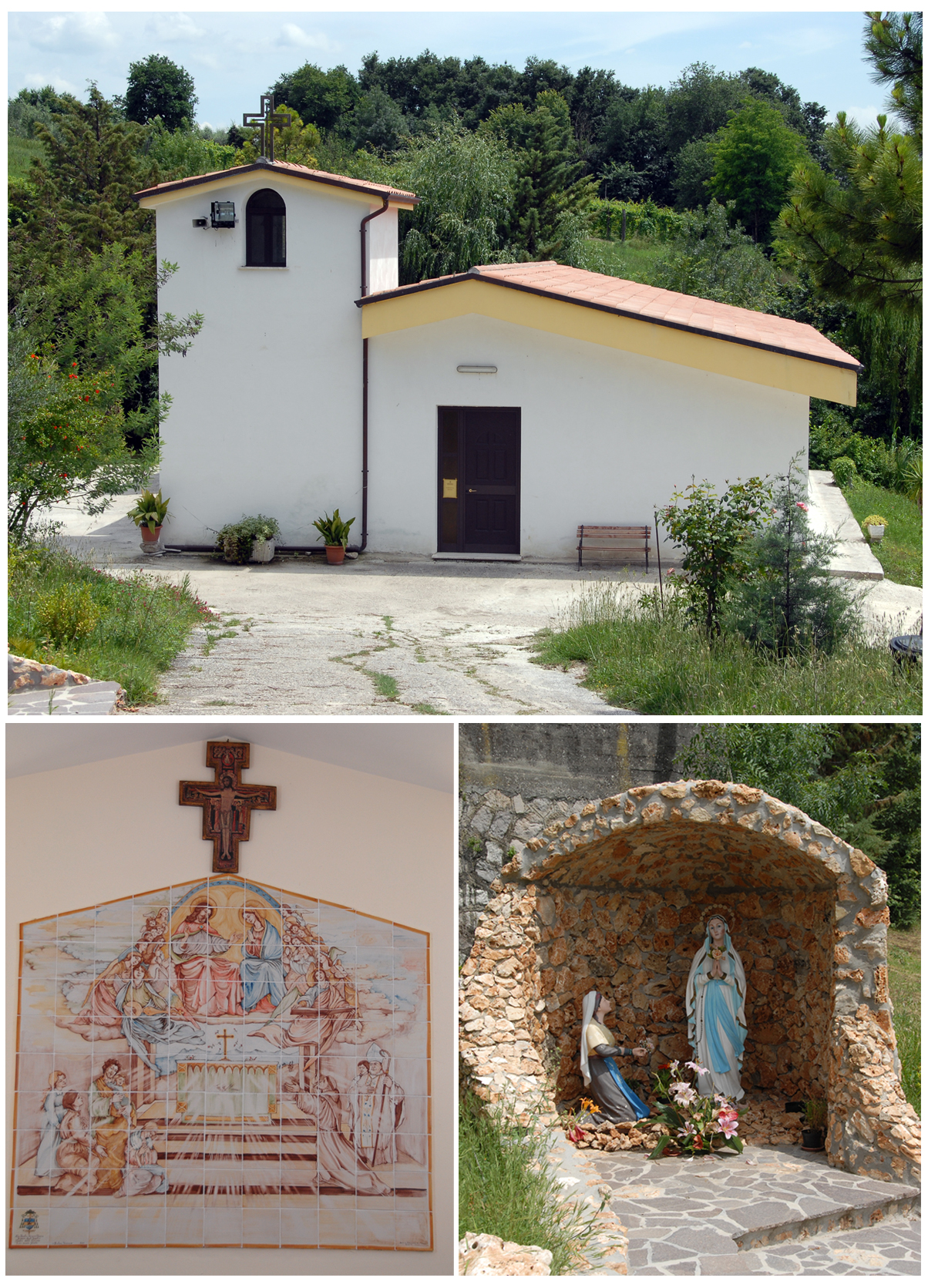 == Licenza d'uso: ==